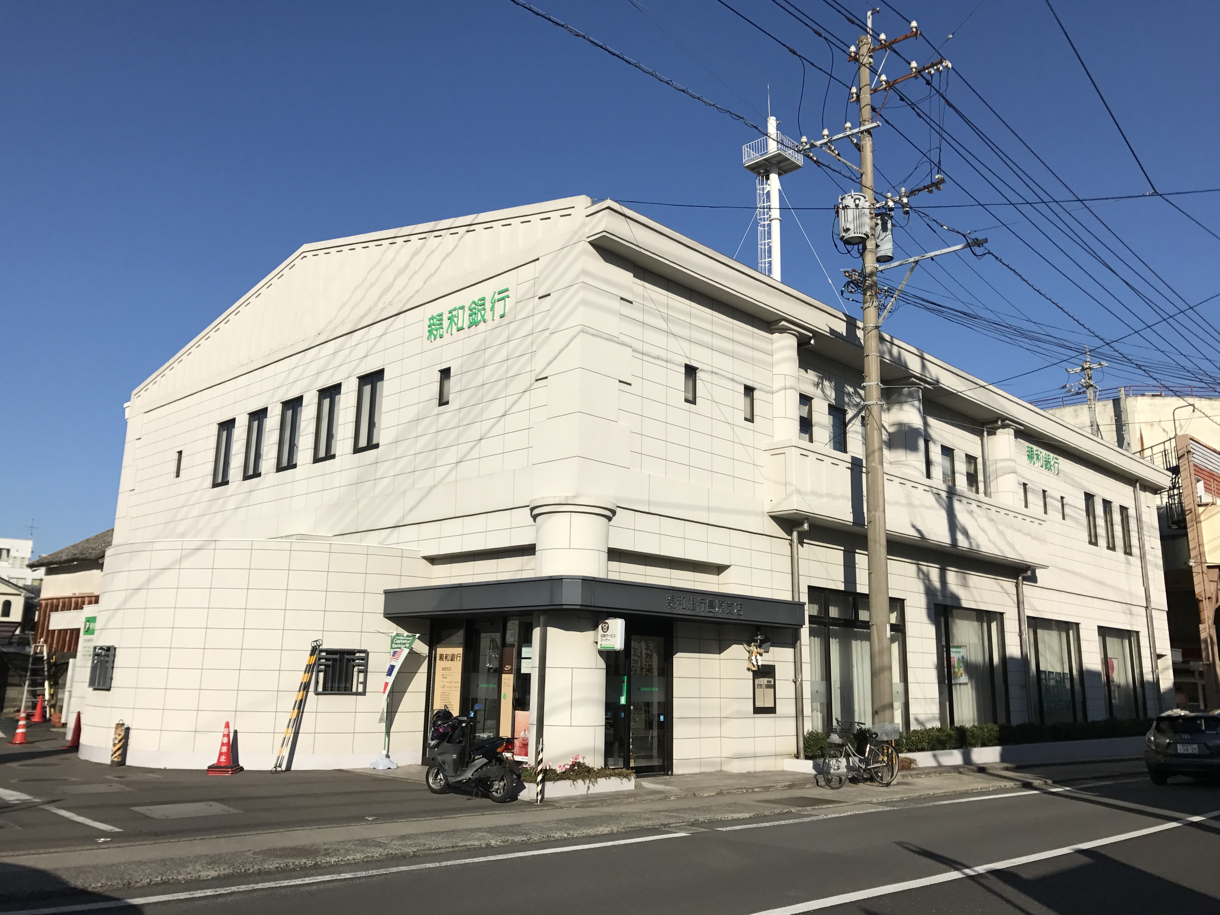 親和銀行島原支店